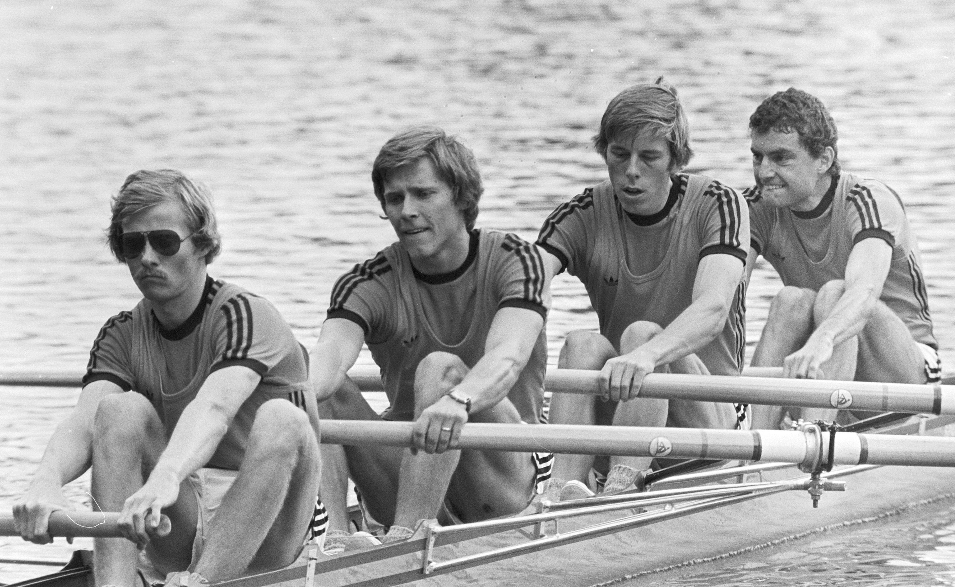 WK roeien op Bosbaan; lichte vier zonder v.l.n.r. Schous, Pieterman, Povel, Lycklama